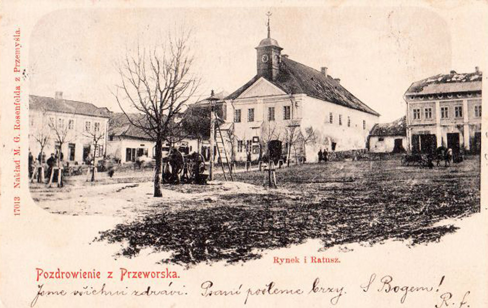 Ratusz w Przeworsku (przed 1910) - fot. archiwalna